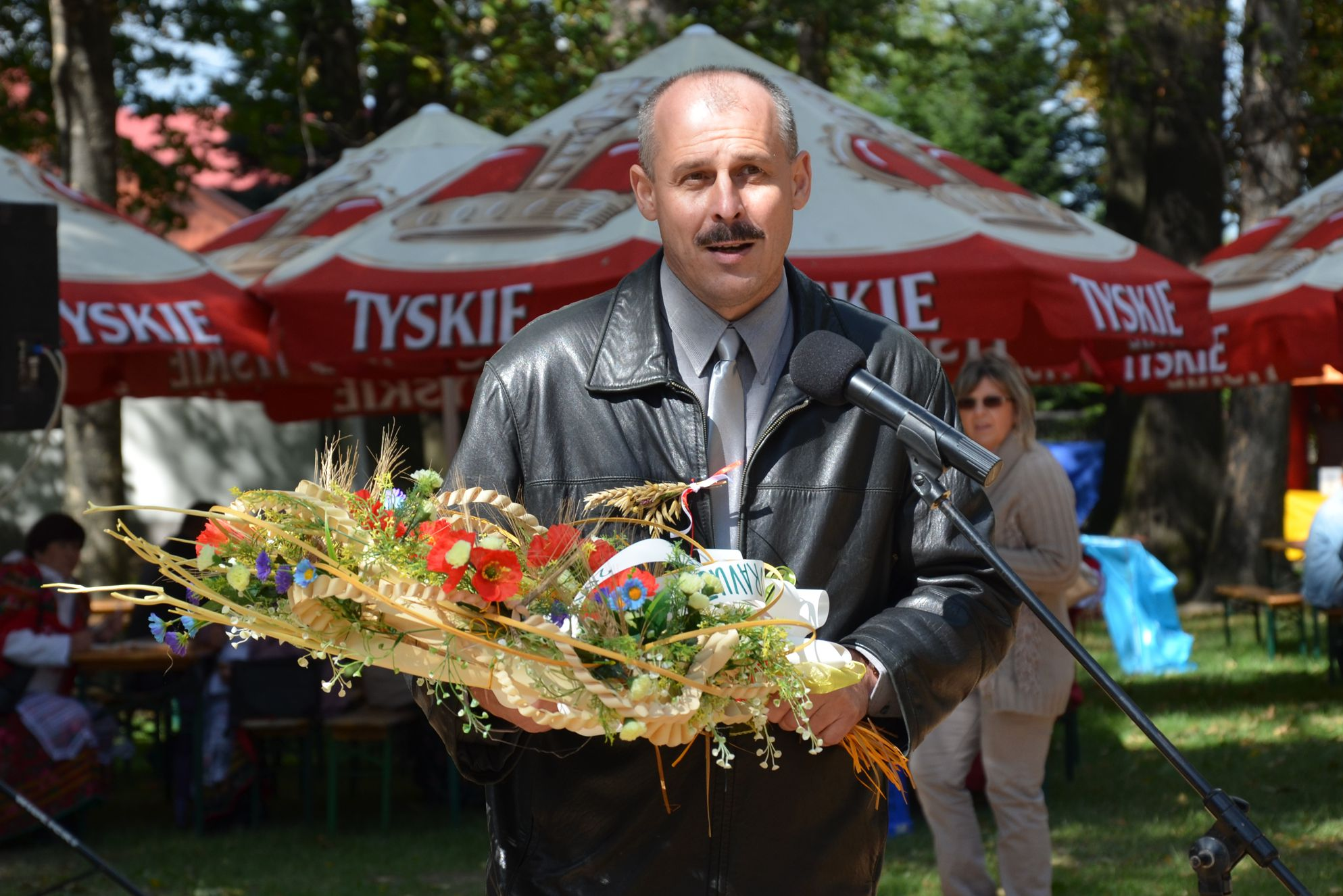 Erntedankfest 2015 in Kozy - Peter Košík (Mošovce)